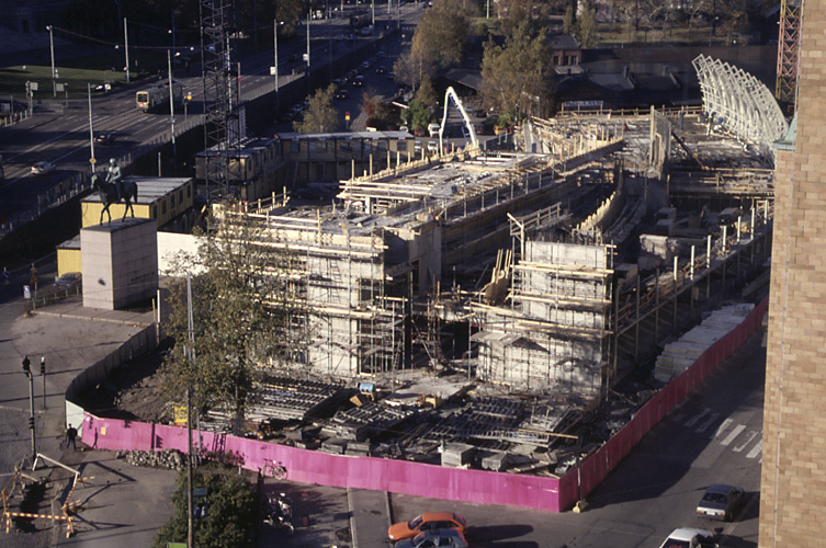 Kiasma construction site in autumn 1996. The colour of the hoarding occasioned a heated debate. Letters to the editor saw the introduction of the colour pink so near Marshal Mannerheim’s equestrian statue as an affront. The outcry calmed down when the section of hoarding behind the statue was painted grey. Kiasman työmaa syksyllä 1996. Työmaa-aidan väri herätti kiivasta keskustelua. Yleisönosastoilla pidettiin röyhkeänä pinkin värin tuomista lähelle marsalkka Mannerheimin ratsastajapatsasta. Tilanne rauhoittui, kun patsaan taustana oleva aitaosuus maalattiin harmaaksi. Photo: Finnish National Gallery / Petri Virtanen